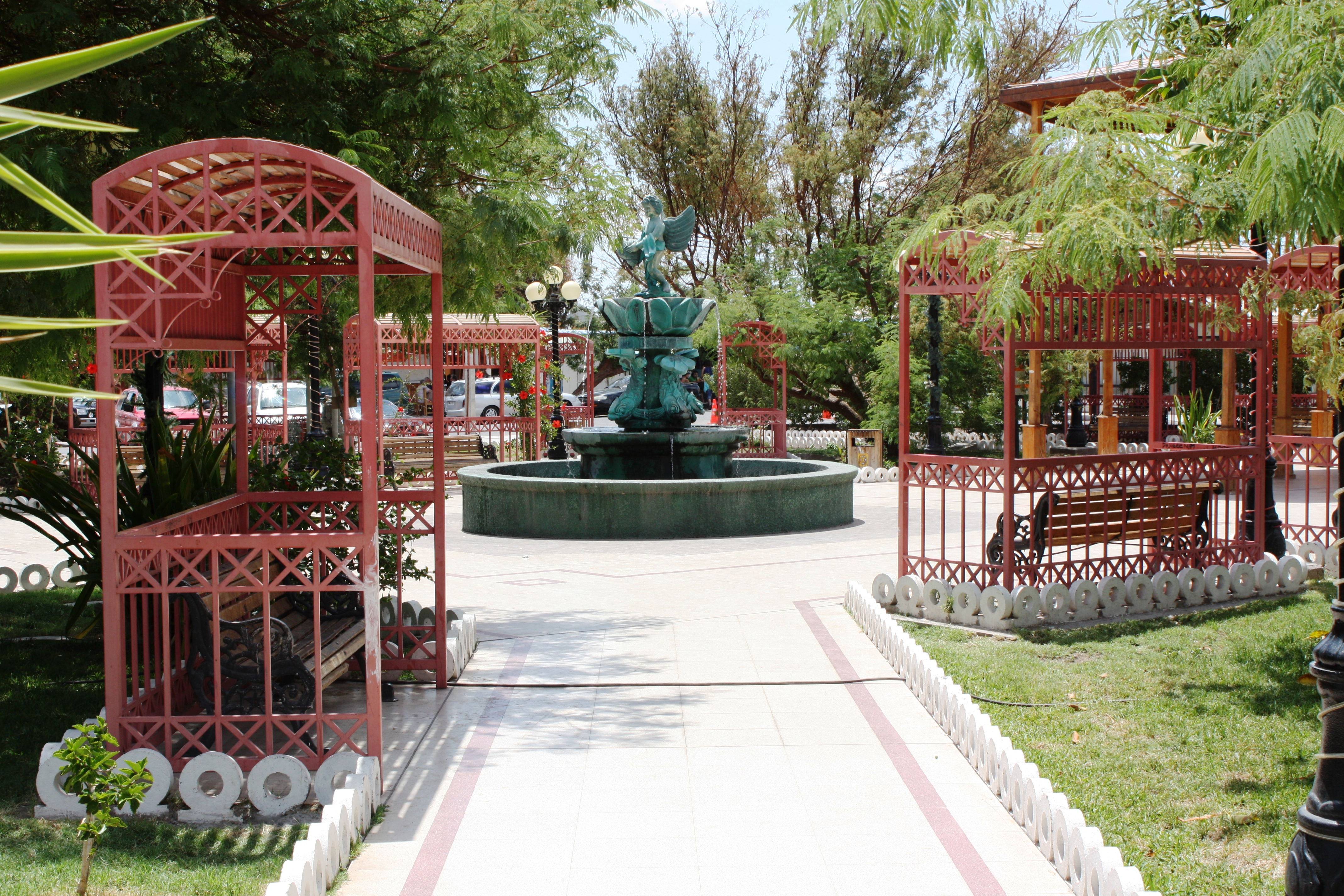 Plaza pública de Pica